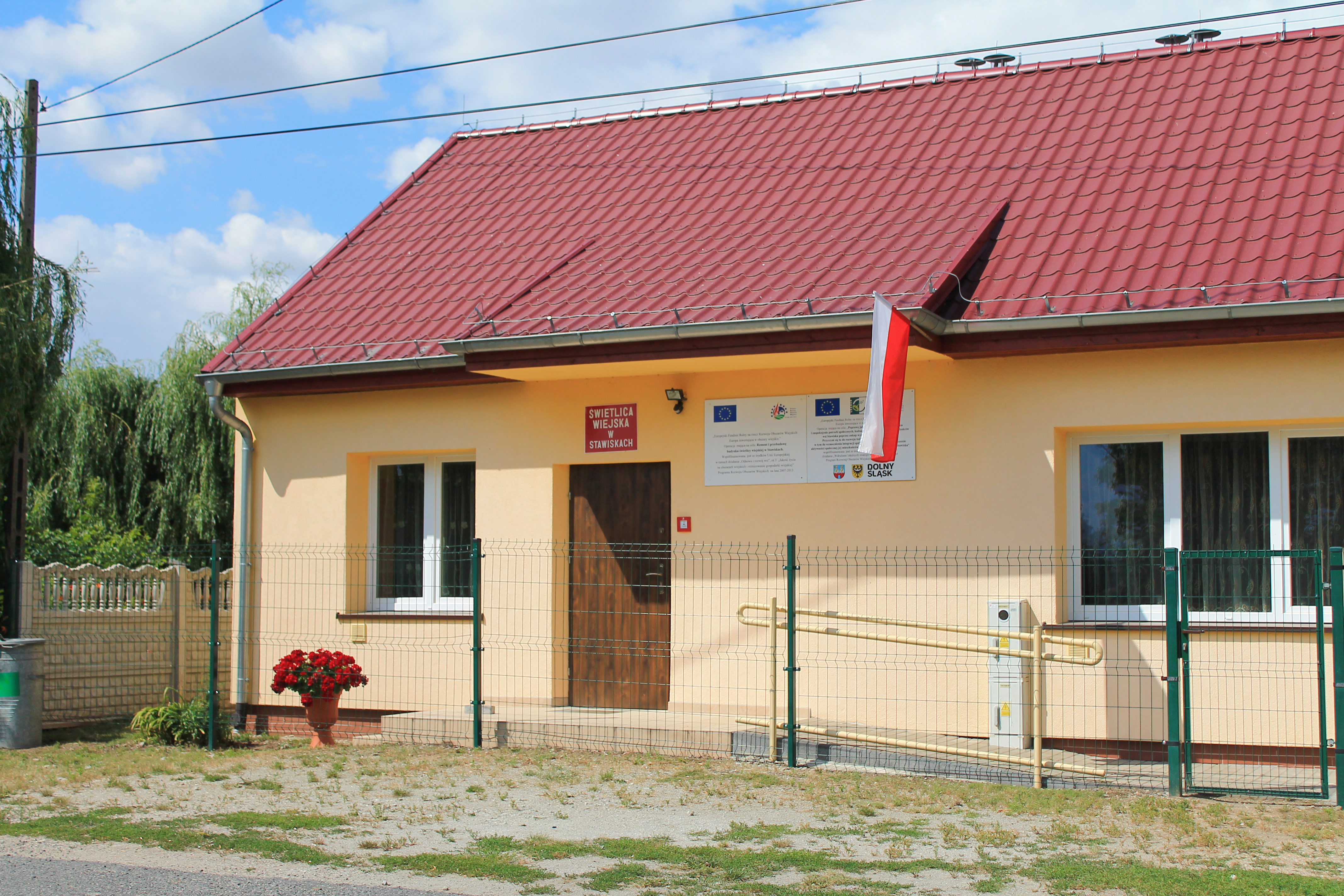 Stawiska, gmina Strzegom, województwo dolnośląskie. Świetlica wiejska